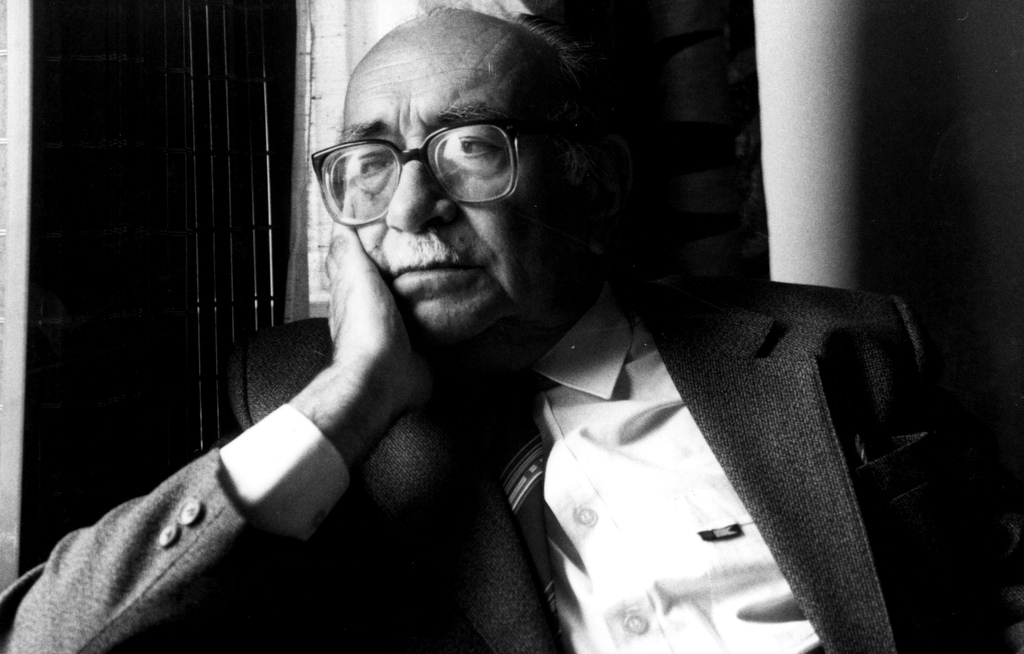 Clodomiro Almeyda Medina (Santiago, 11 de febrero de 1923 - ibídem, 25 de agosto de 1997) fue un político chileno, dirigente del Partido Socialista.